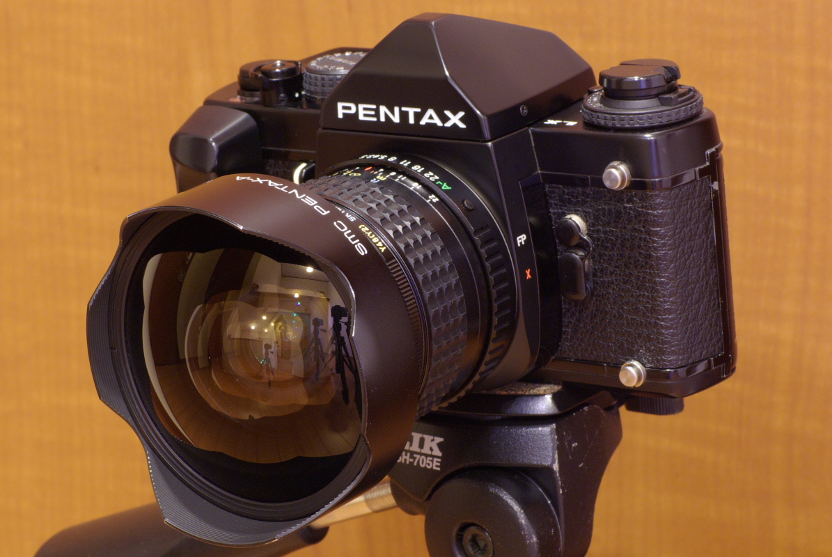 PENTAX LXとsmc PENTAX-A 15mm F3.5